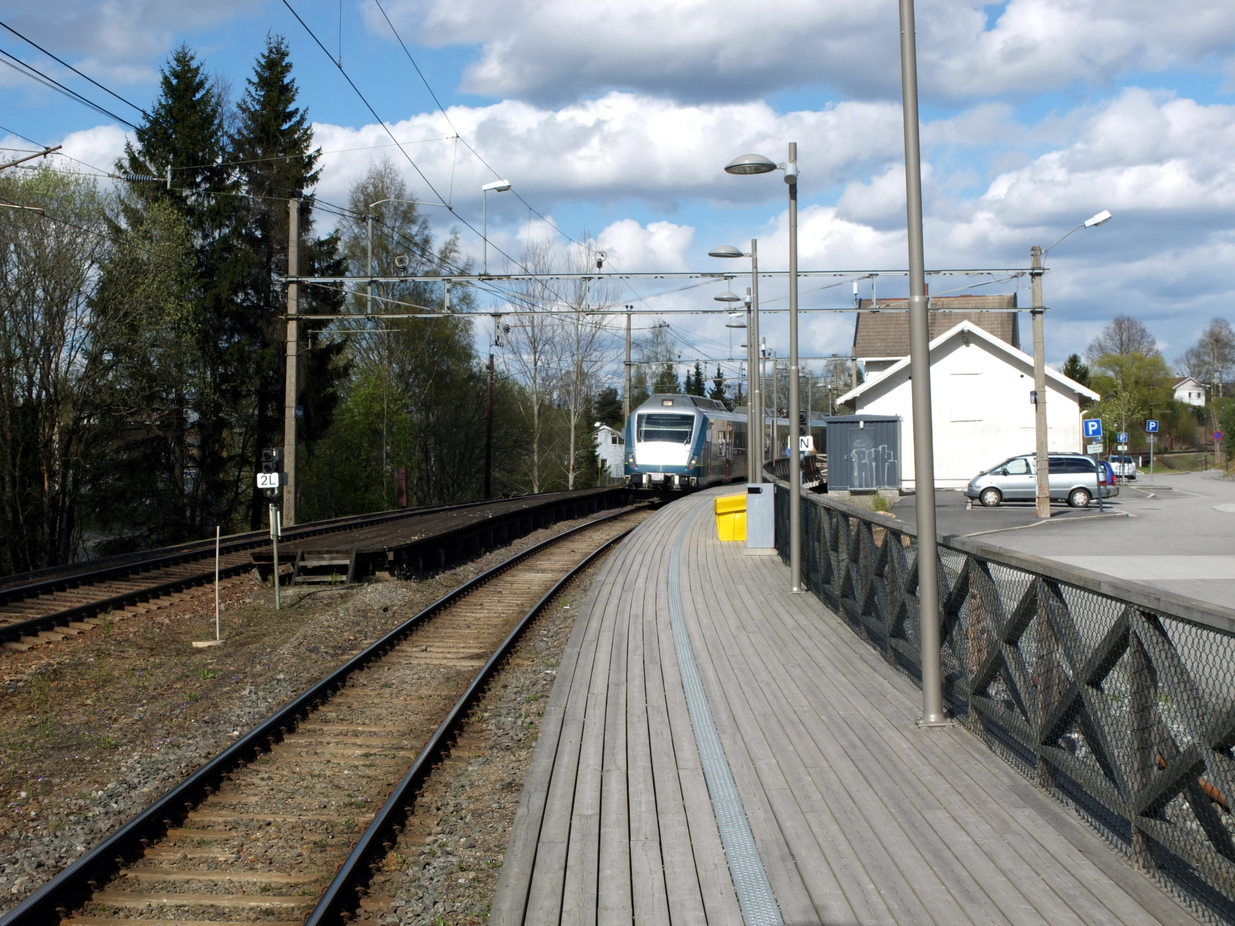 Frogner stasjon